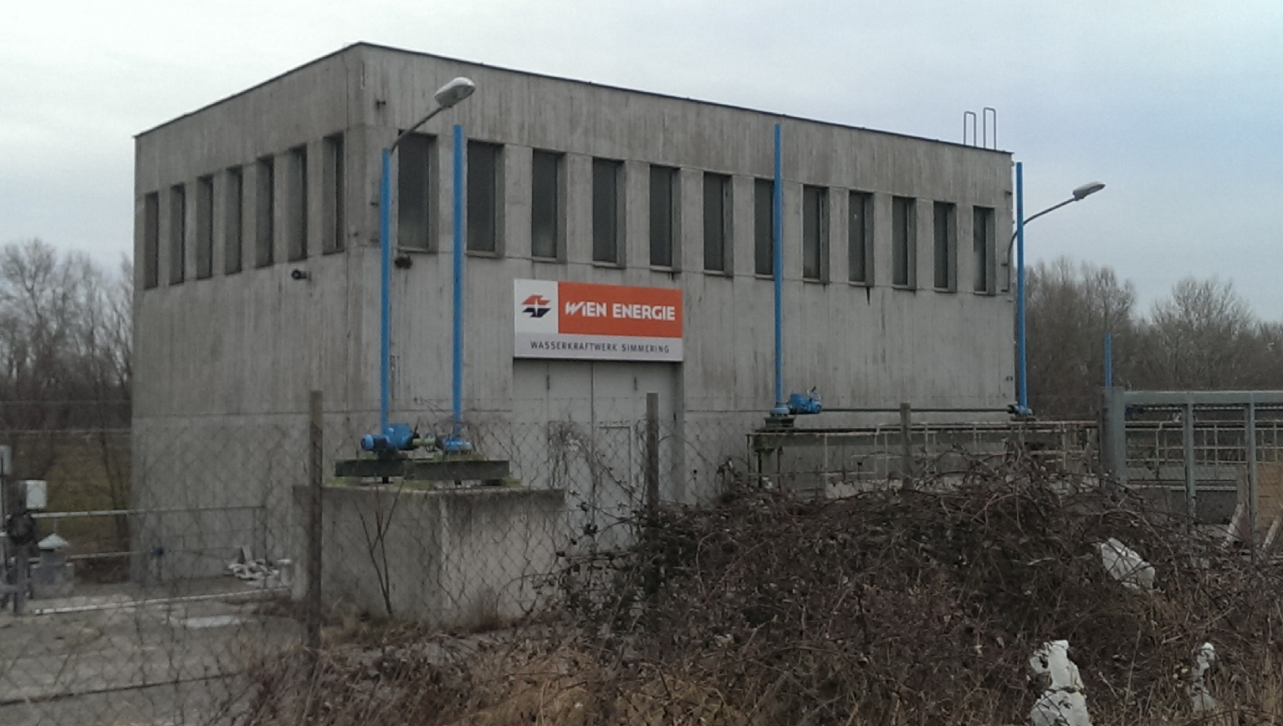 Kraftwerk Simmering: das Maschinenhaus der Auslaufturbine des KW Simmering, beschriftet als "Wasserkraftwerk Simmering" zwischen Donaukanal und Ostautobahn